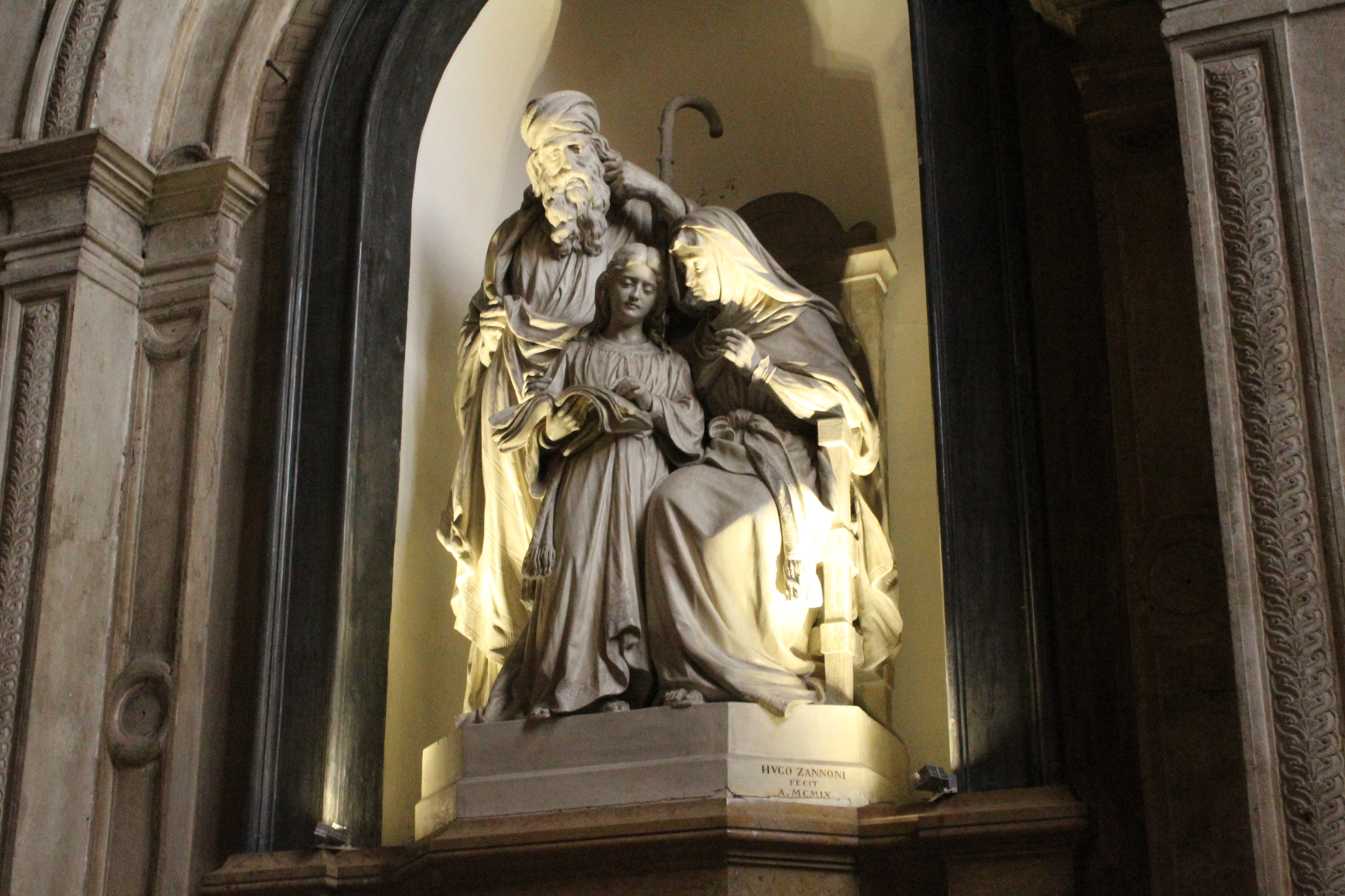 Altare Dolcetti. Statua raffigurante San Gioacchino, Sant'Anna e la vergine fanciulla che legge, Autore Ugo Zannoni. Chiesa di San Tomaso Cantuariense, Verona